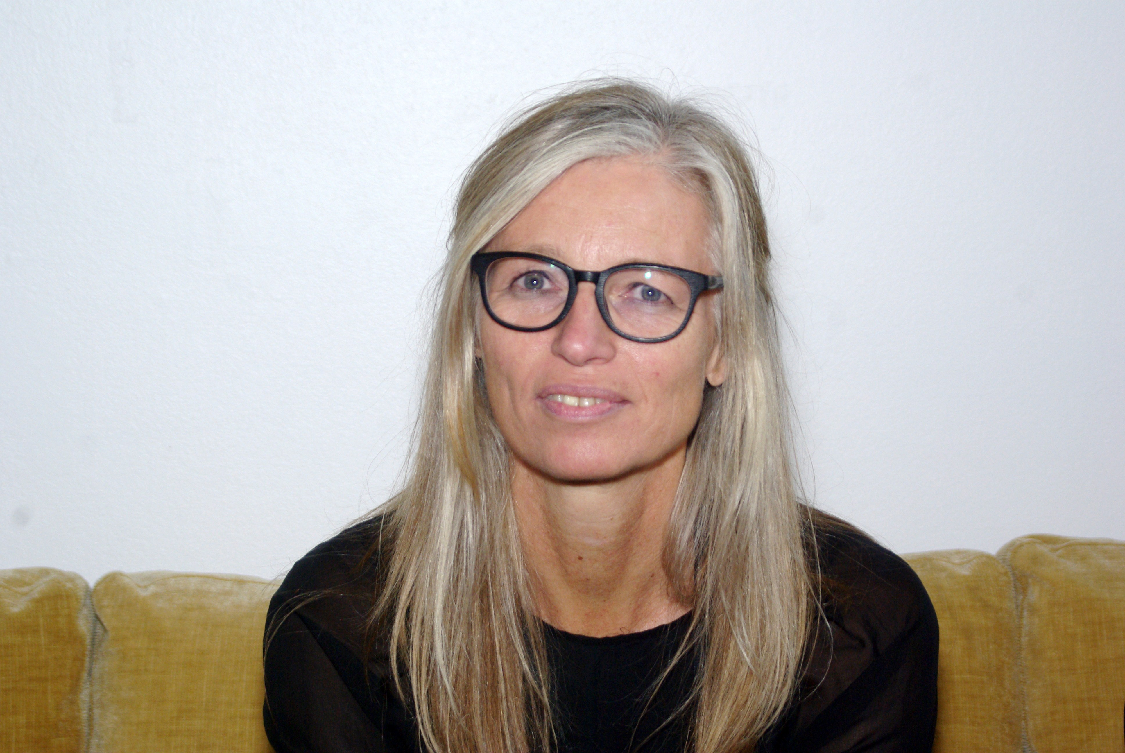 La escritora, diseñadora gráfica e ilustradora danesa Hanne Kvist la Feria Internacional del Libro de Santiago 2015